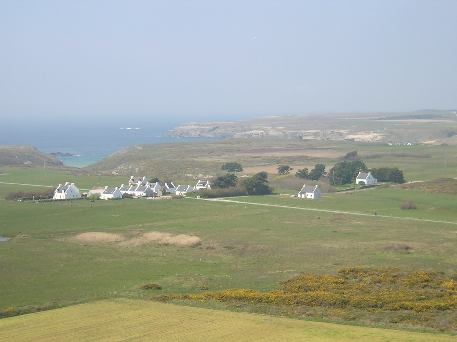 Belle-Île-en-Mer (Morbihan, France), la côte sauvage vue du Grand Phare.